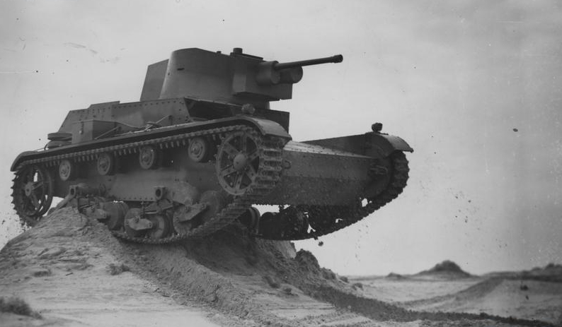 Czołg lekki 7TP podczas pokonywania nasypu.